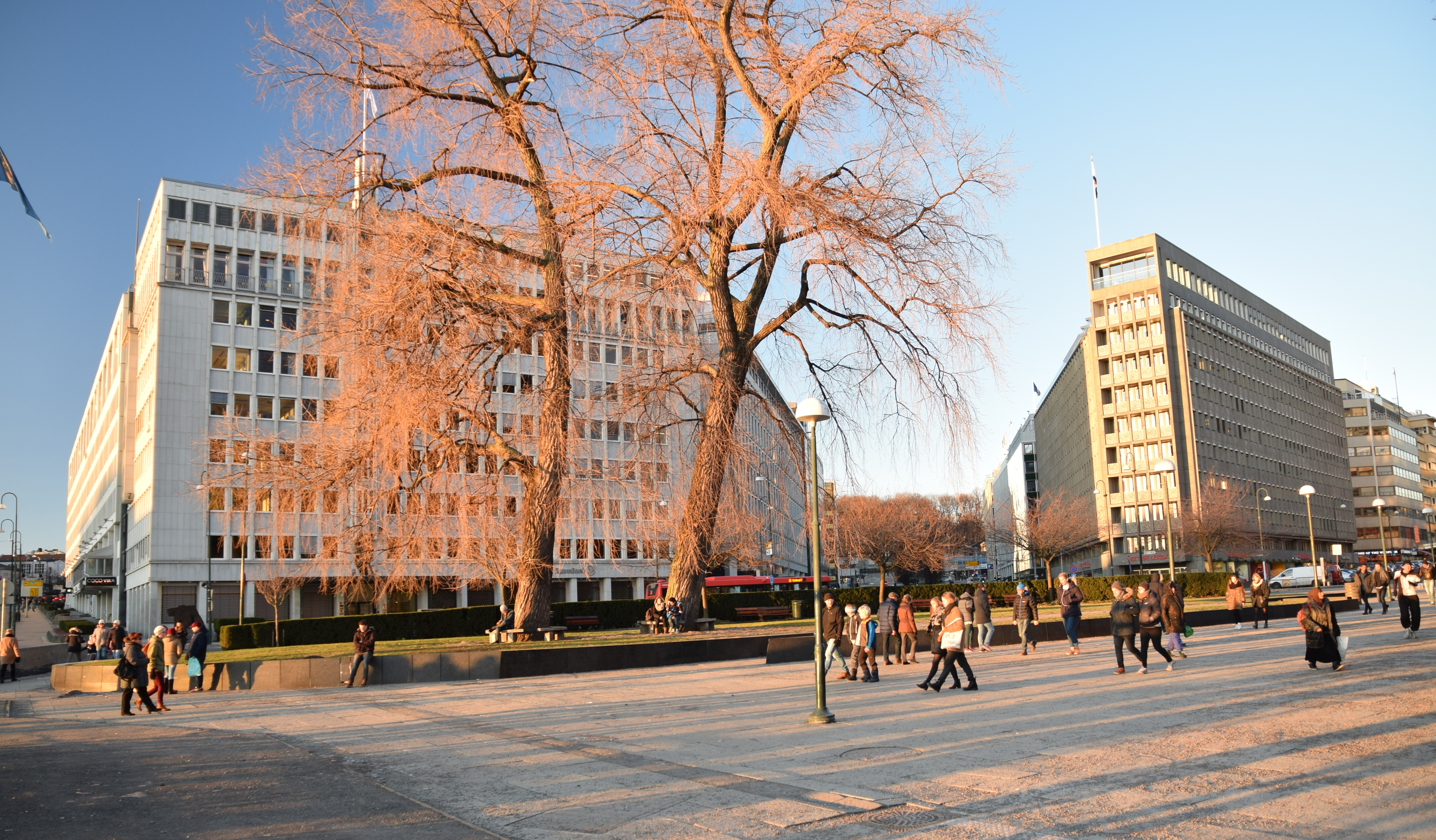 Olav Vs plass, ved Oslo rådhus, sett fra Rådhusplassen